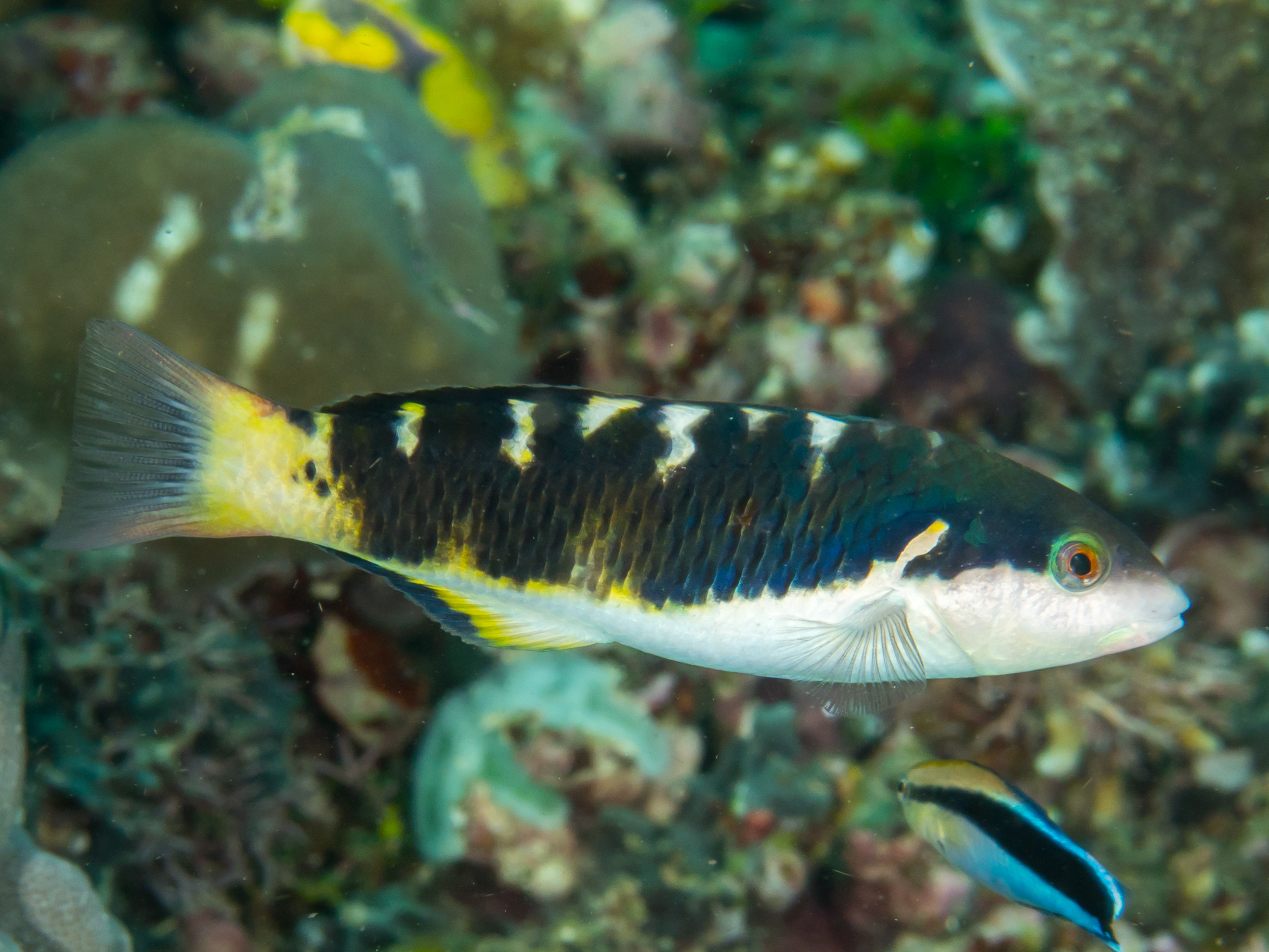 Morotai, Indonesia - Jansen's wrasse (Thalassoma jansenii)